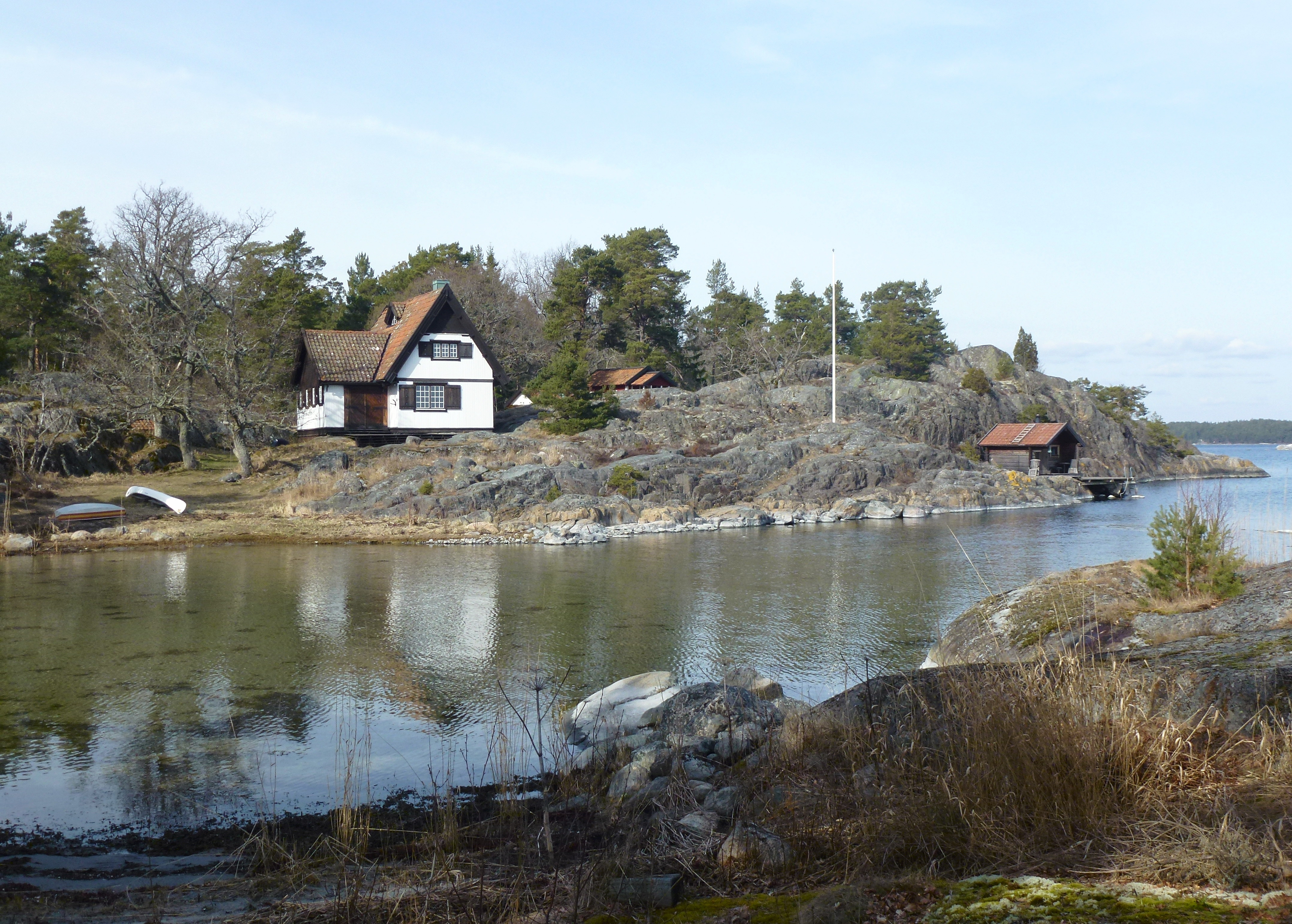 Villa Torsvi, konstnären J.A.G. Ackee sommarvilla på östra Torö i Nynäshamns kommun.